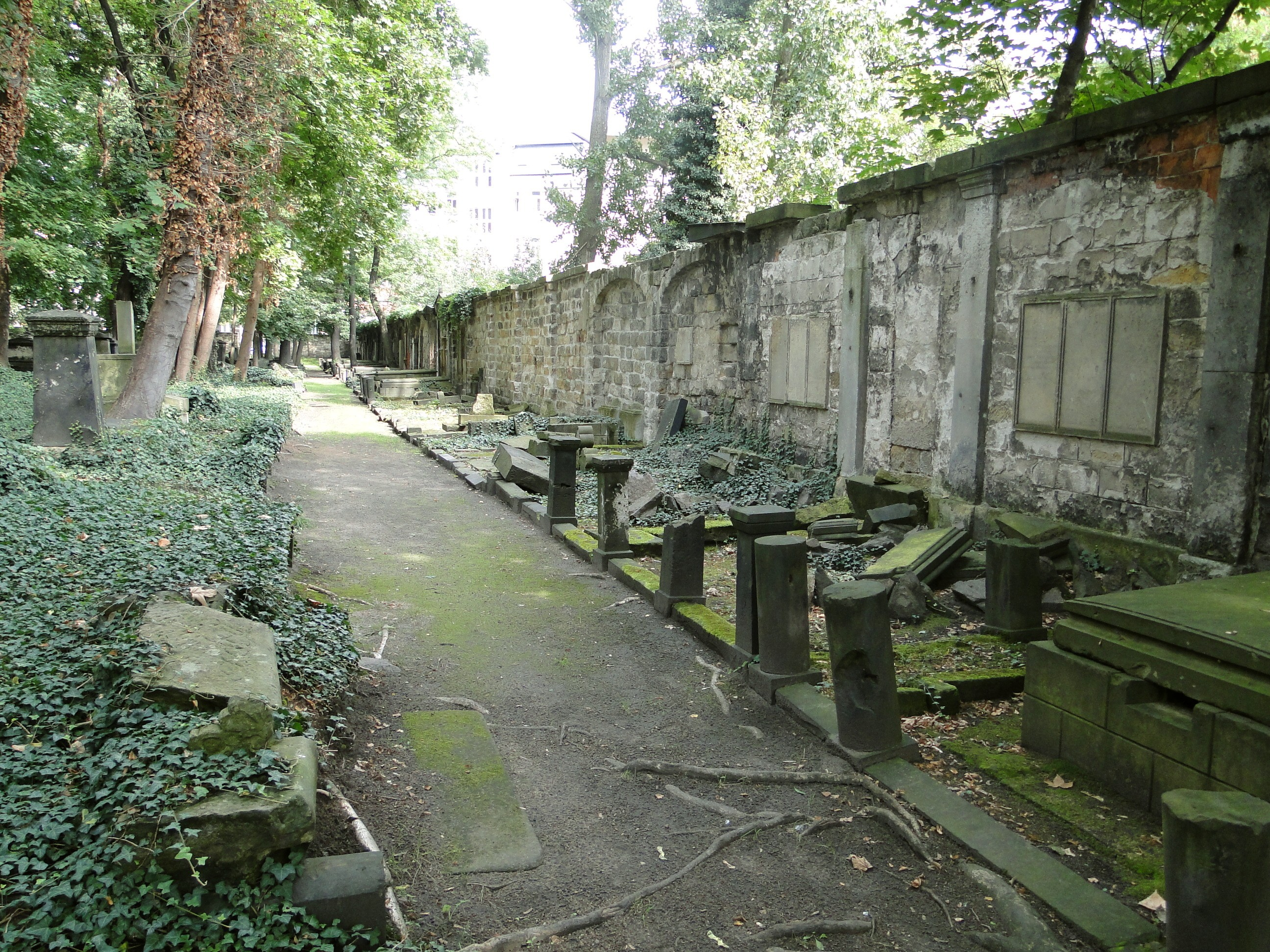 Verfallene offene Schwibbogengrüfte auf dem Eliasfriedhof in Dresden